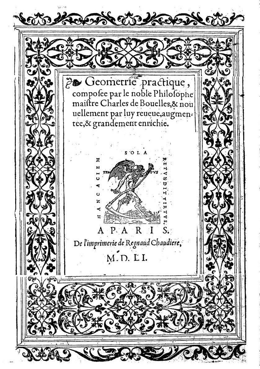 Geometrie practique, composee par le noble philosophe maitre Charles de Bouelles, & nouellement par luy reueue, augmentee, & grandement enrichie. - A Paris : de l'imprimerie de Regnaud Chauderie, 1551. - 70 c. : ill. ; 4º .